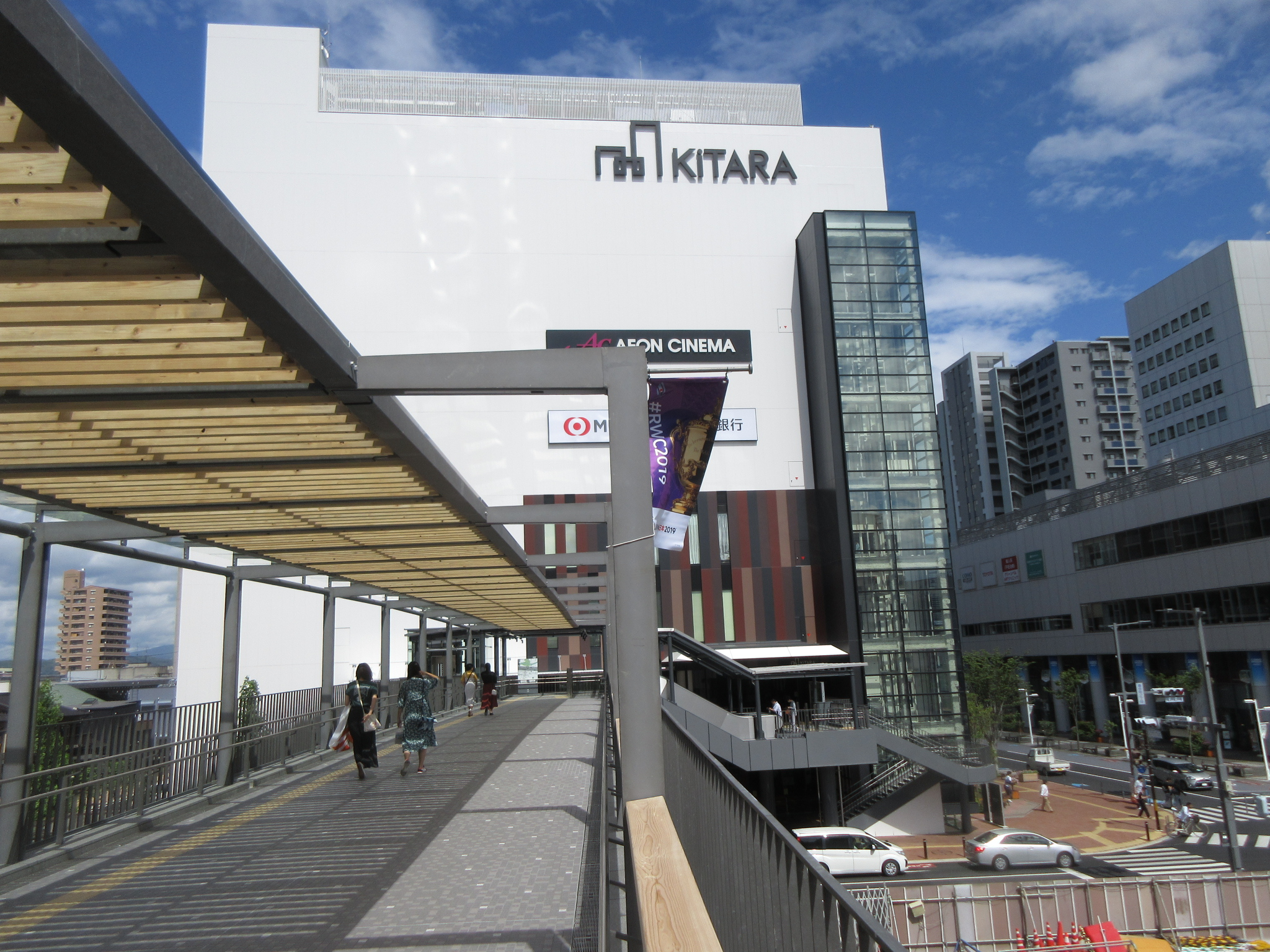 KiTARA。2019年6月4日に開通した豊田市駅東口ペデストリアンデッキ（GAZAからKiTARAまで）。